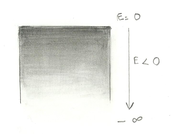 Représentation de l'état fondamental du vide quantique d'après Paul Dirac